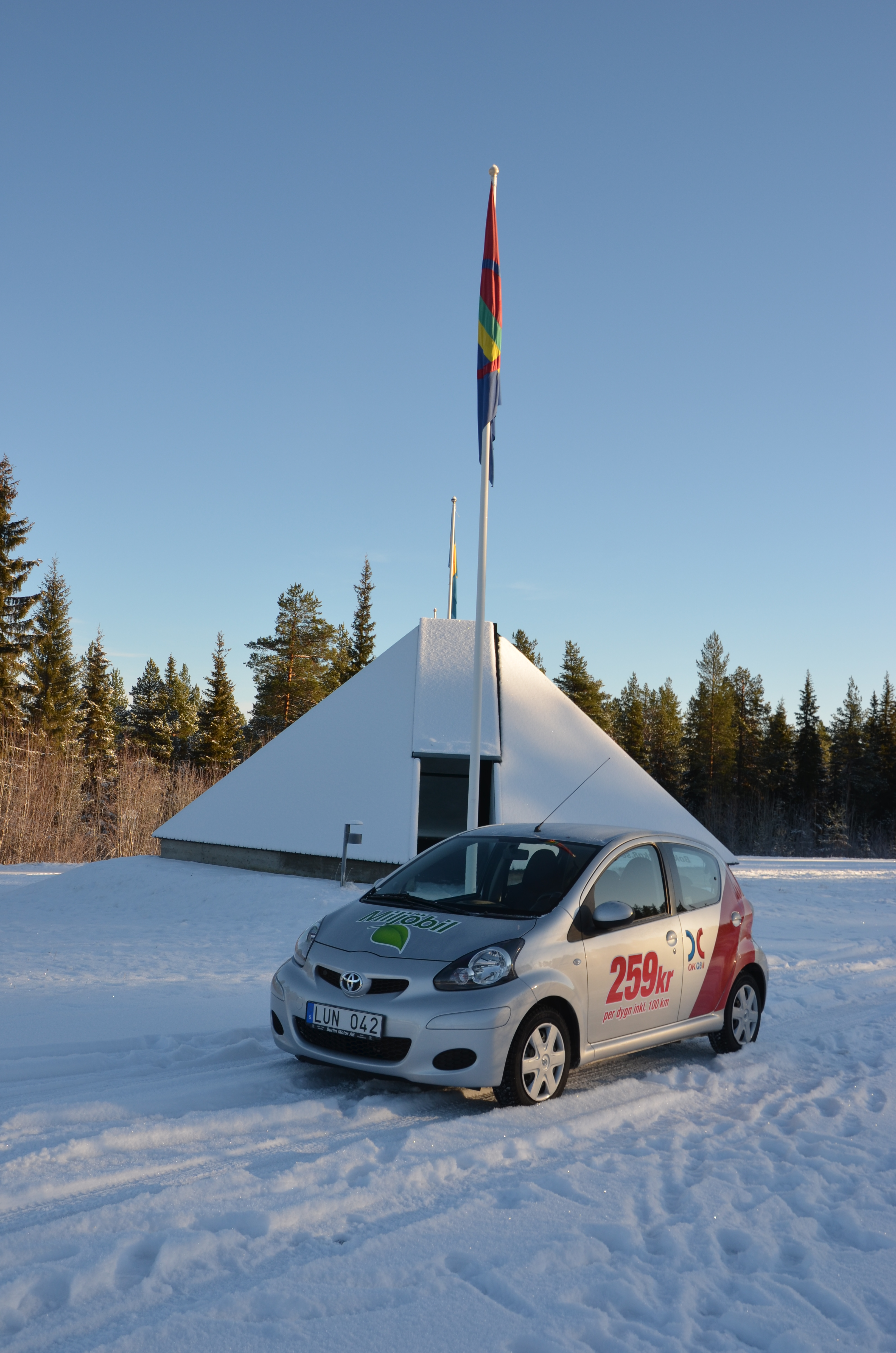 Wikimedia Sverige på väg till kurs på Ajtte fjäll och samemuseum oktober 2012. Bilden är tagen den 28 oktober 2012 där riksväg 97 passerar polcirkeln, norr om Vuollerim och 14 kilometer söder om Jokkmokk. Polcirkelkåtan är ritad av Per Persson och Mats Winsa, MAF Arkitektkontor i Luleå